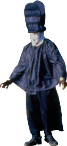 Rußhexe